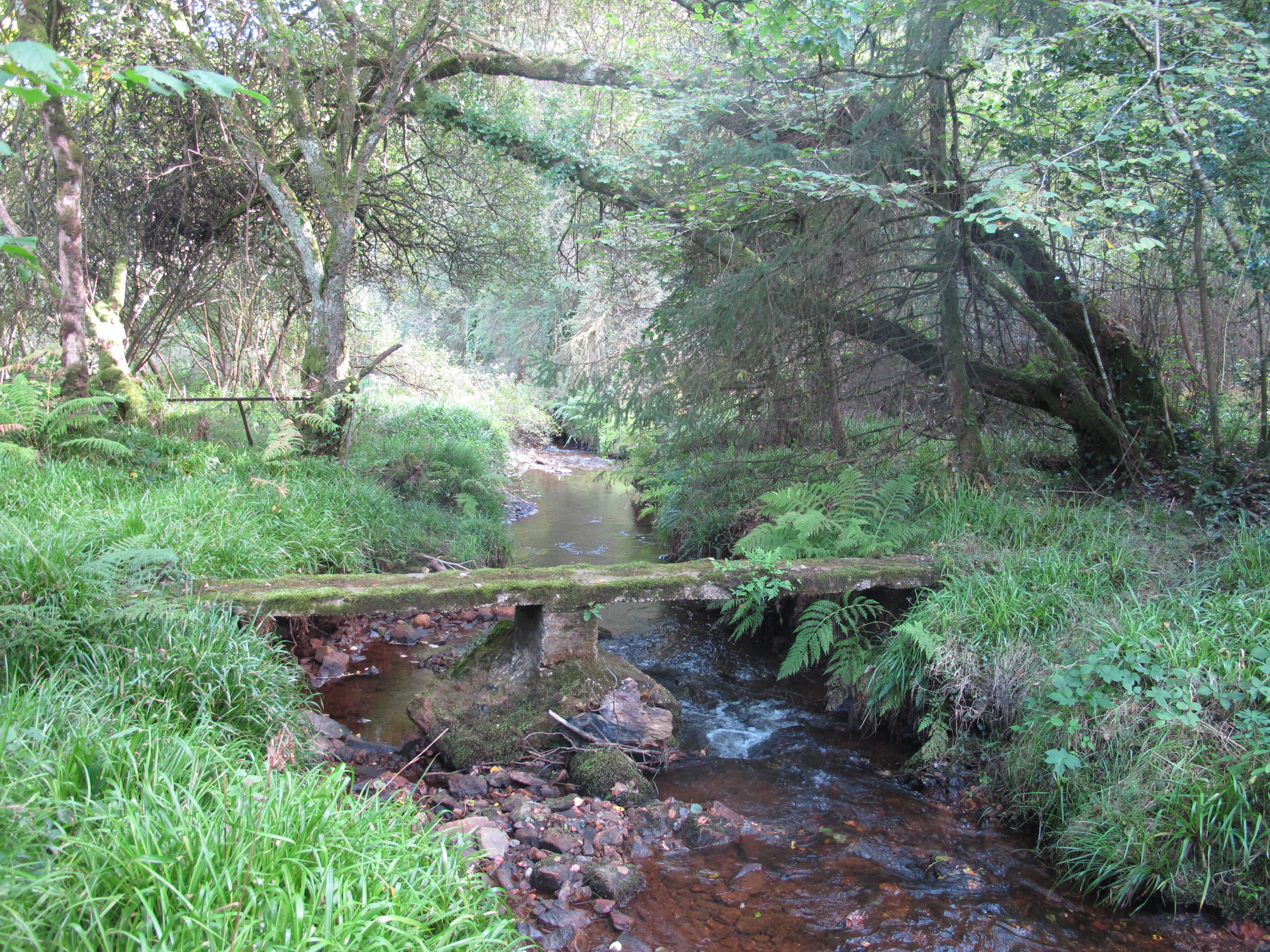 Affuent de la Rivoal à Pont-Asket en amont de Meilh-Pont-Glas. Ce ruisseau est alimenté par Stêr-Glujoù venant de Kroaz-ar-Foenneg (alias Croas-Oannec en limite de Lopérec, au bout de la route de Park-ar-Saon) et par Stêr-Roudoù venant du vallon de Lann-ar-Marroù en limite de St-Cadou-Sizun, en bordure du Chemin du Comte.